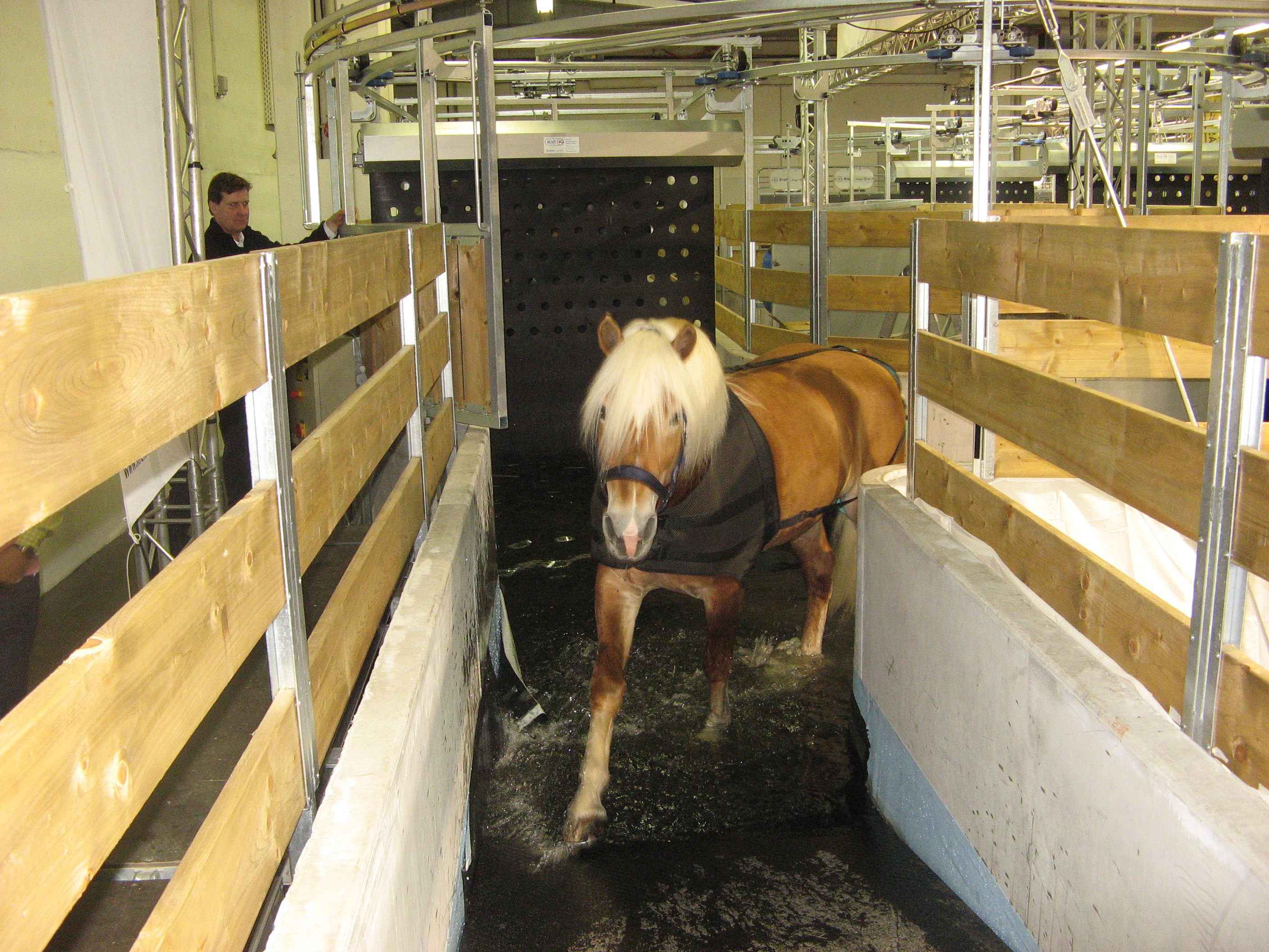 Demonstration Pferd in Wasser-Führanlage bei der Messe Equitana, Essen, 2011